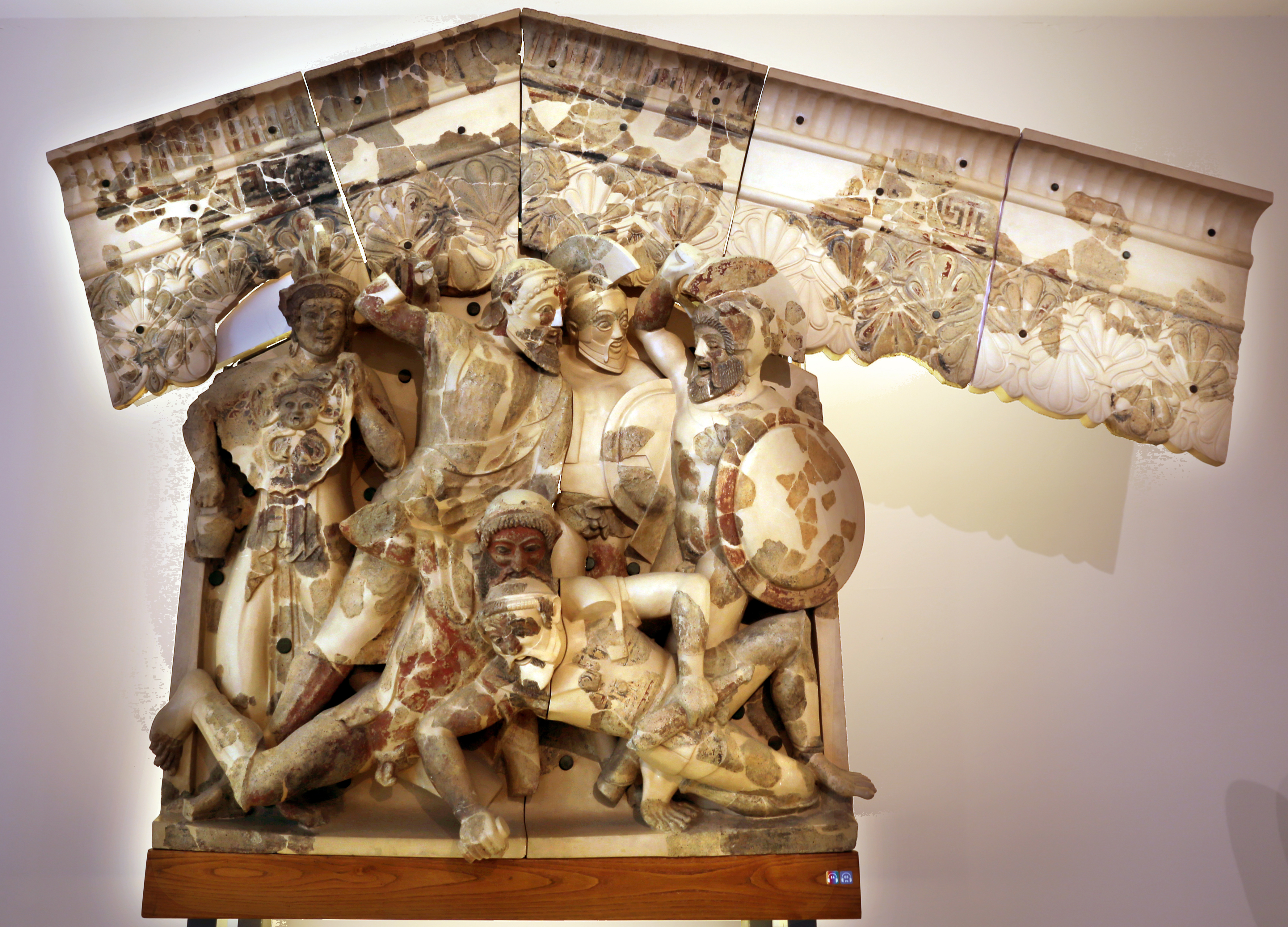 Villa Giulia (Rome) This is a photo of a monument which is part of cultural heritage of Italy.